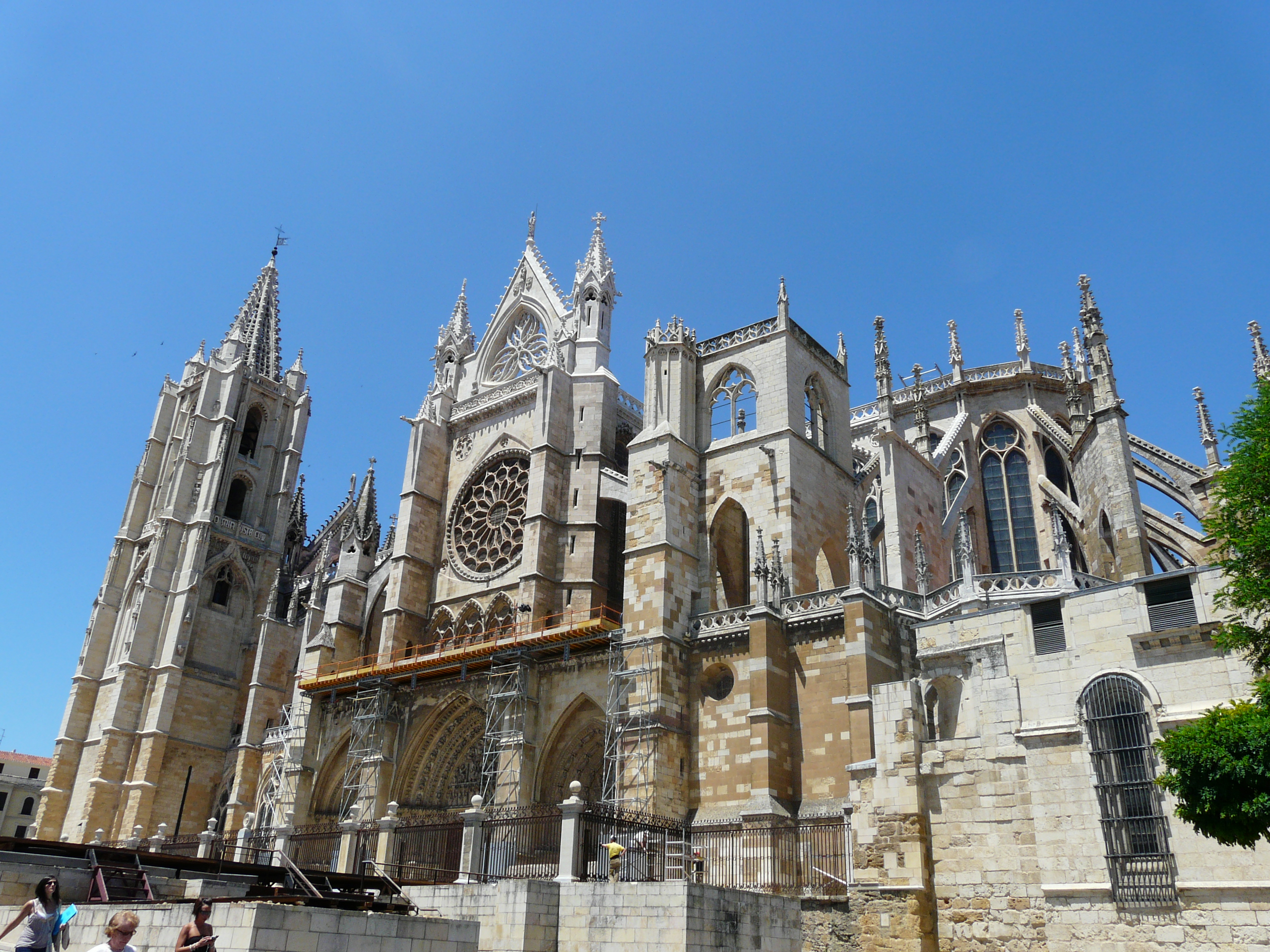 Fachada sur Catedral de León 2